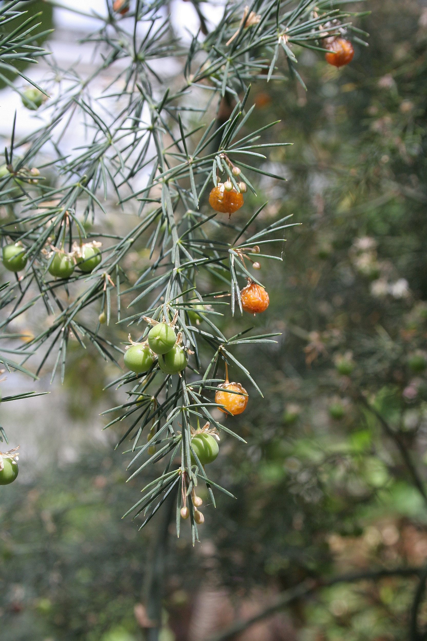 Asparagus fallax Conservatoire botanique national de Brest, France, Juin 2007